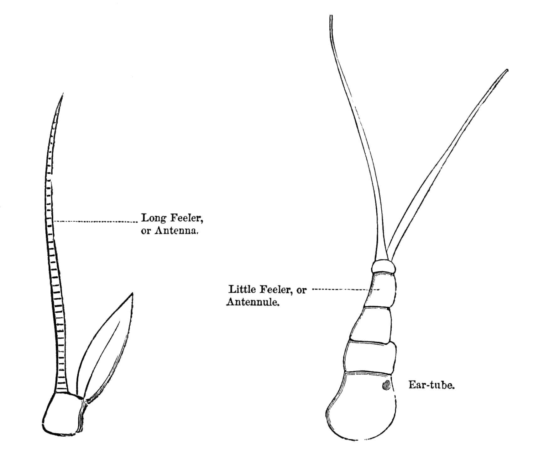 Lobster antennae